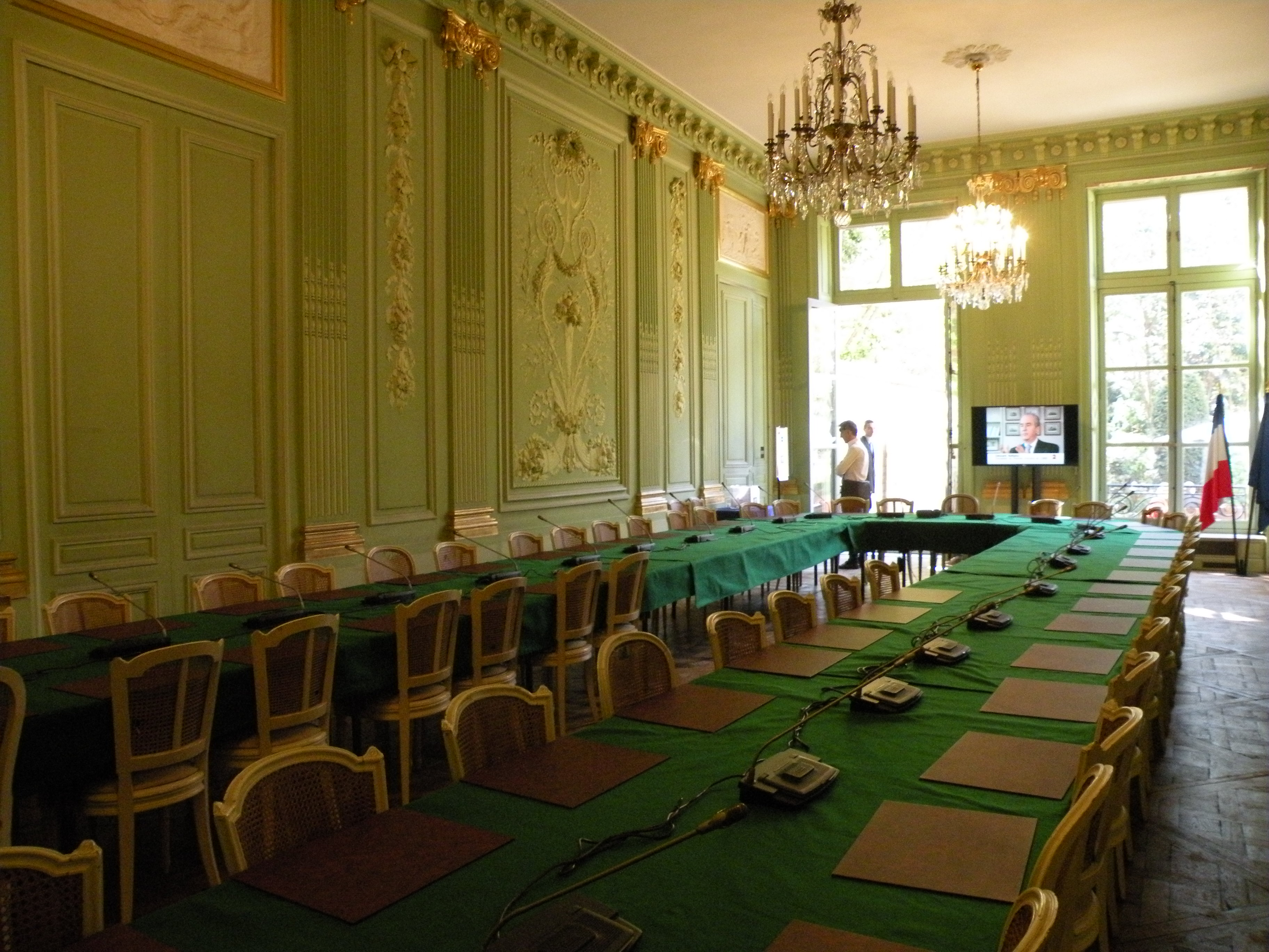 Hôtel du Châtelet